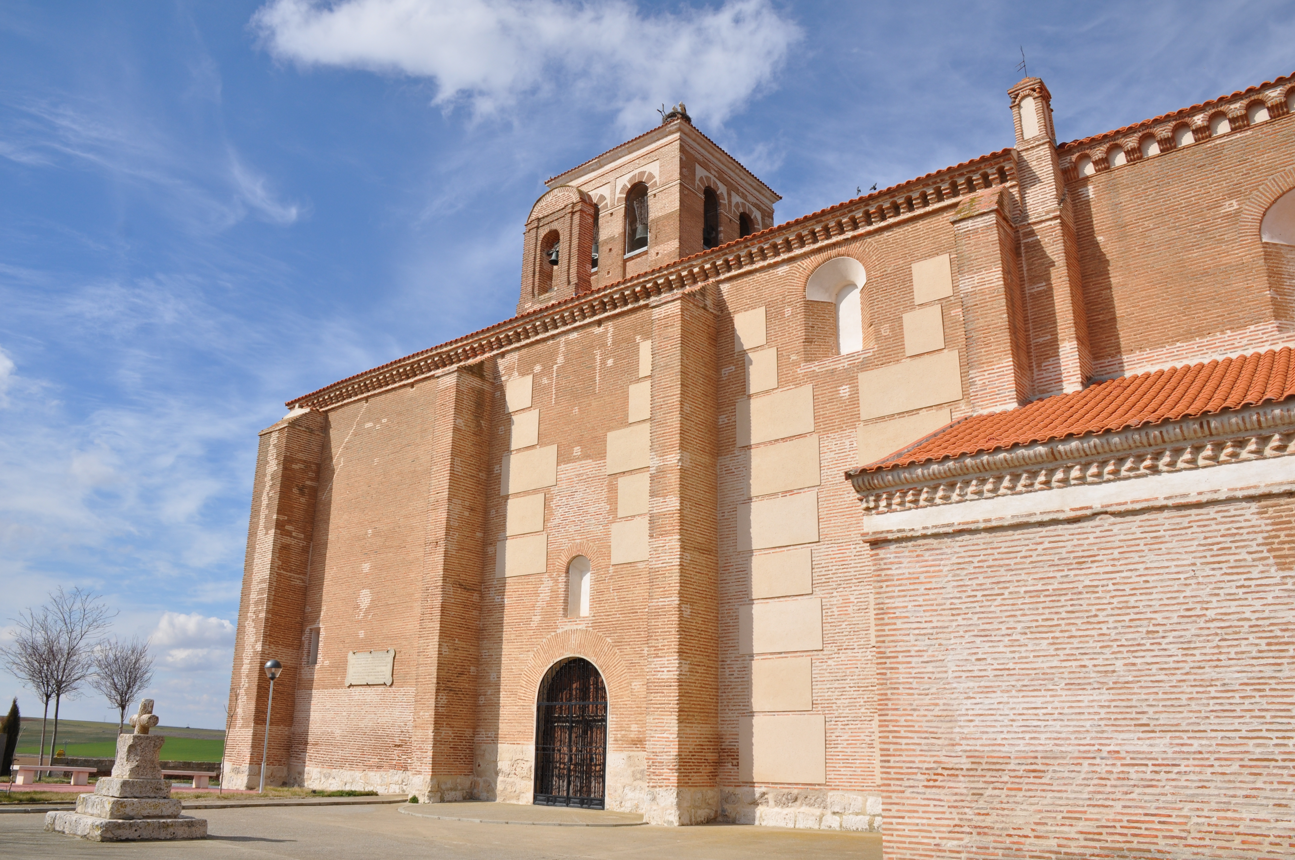 Vista de la iglesia de Ventosa de la Cuesta, Valladolid (España).